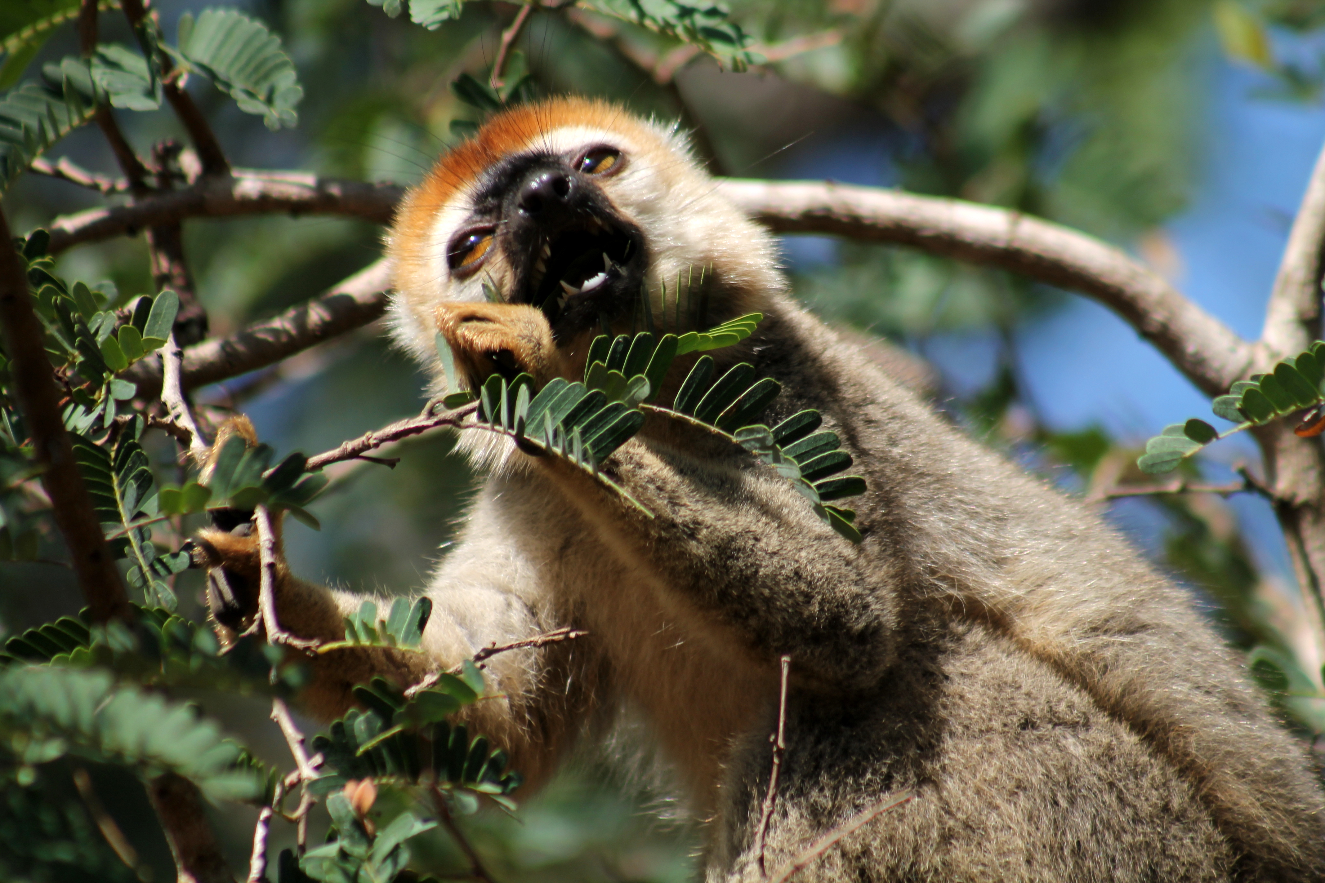 Roodkopmaki in Kirindy